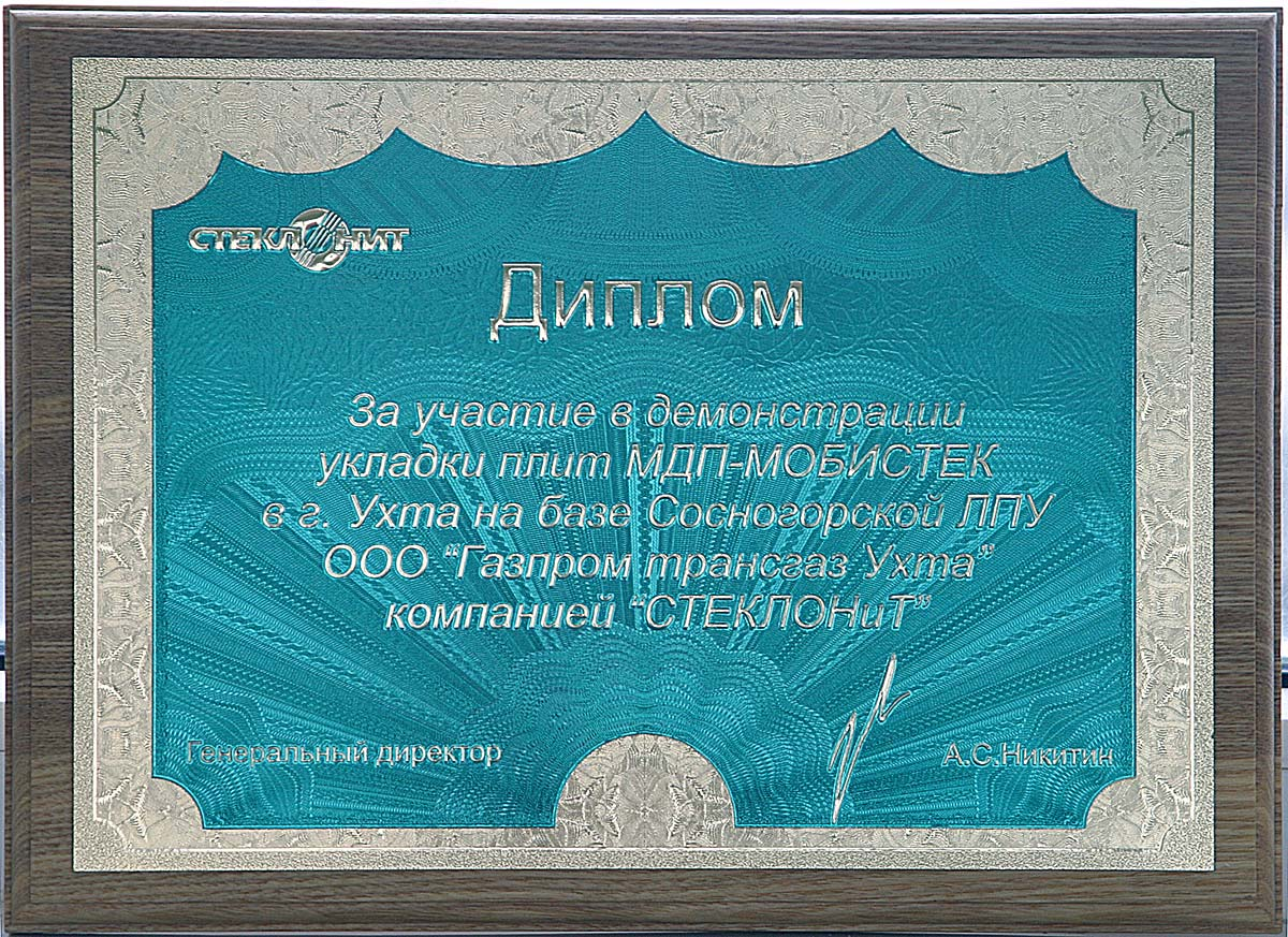 Плакетка с рельефным тиснением для компании Стеклонит